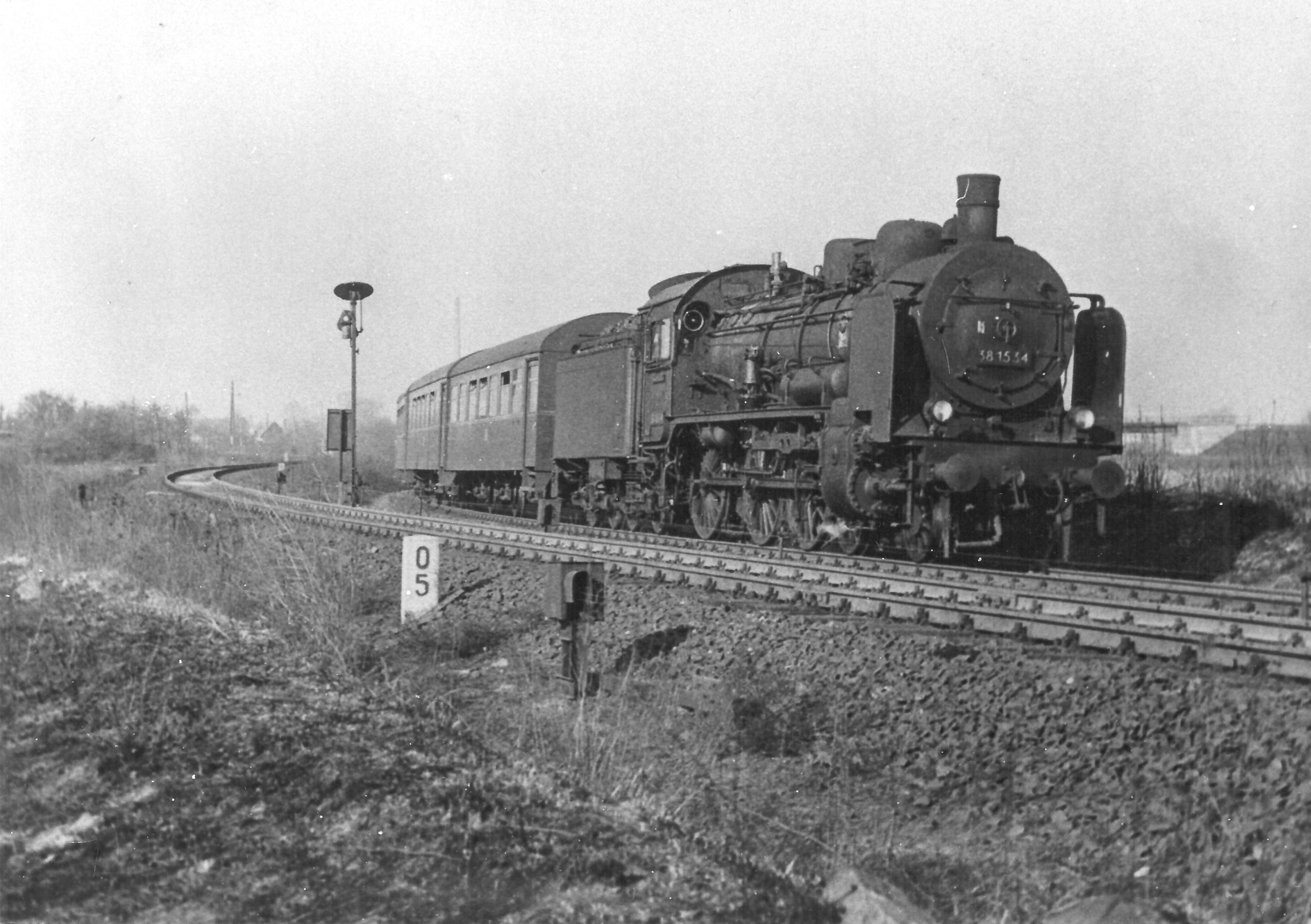 Dampflok 38 1534 mit ein Personenzug auf der Wriezener Bahn zwischen Marzahn und Magerviehhof. Vorn die Herzbergkurve, rechts im Hintergrund die GAR-Brücke.